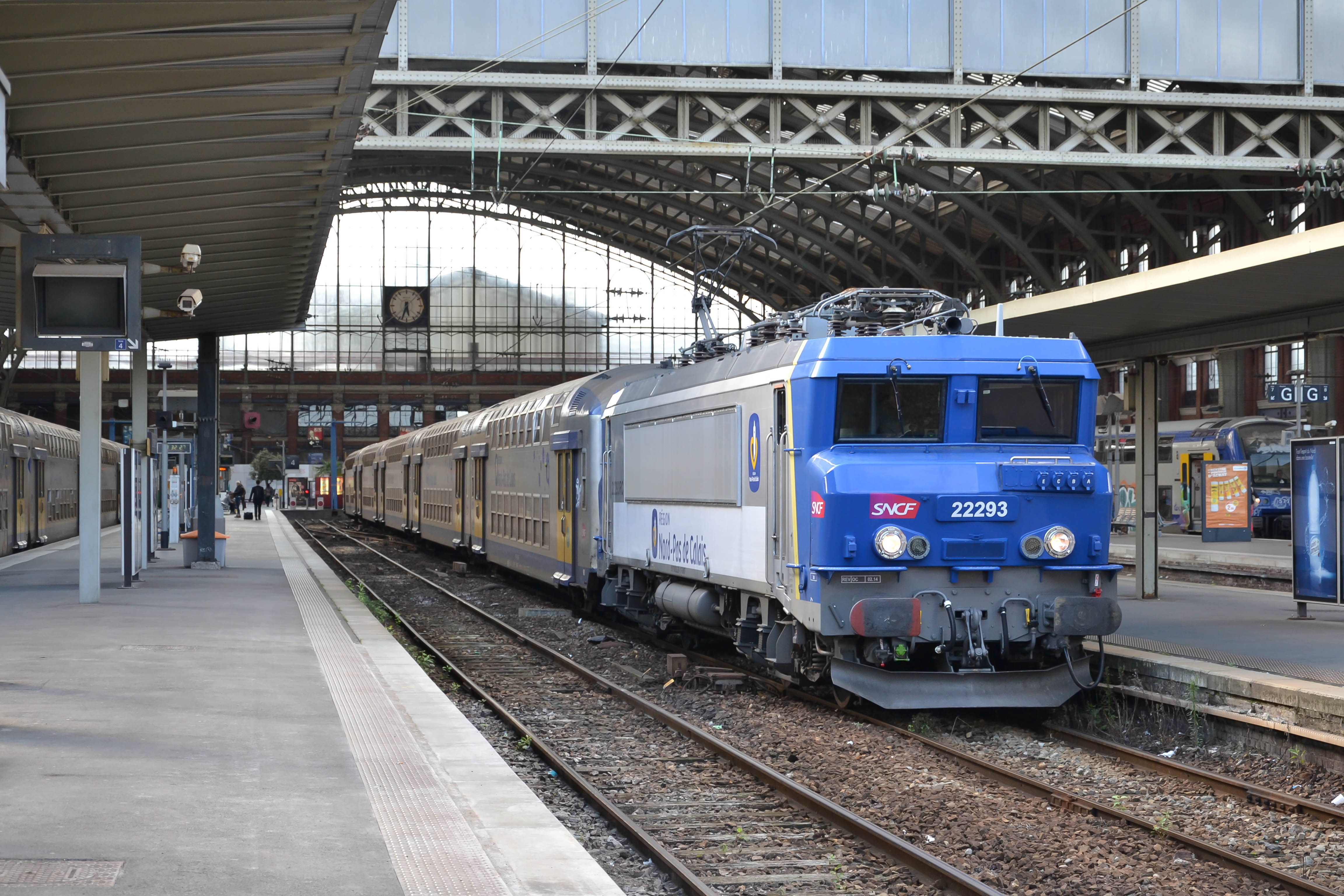 De laatste keer dat ik, voor de dag waarop deze foto genomen is, in Lille ben geweest was in april, en in april maakte ik een foto die nu alweer verleden tijd is. Sinds kort hebben de BB 25500-locs van ruim veertig jaar oud het veld moeten ruimen, en zijn zij in Nord-Pas-de-Calais vervangen door BB 22000-locs, de oudere broer van de Nederlandse 16/17/1800-locs. Het voordeel is gelukkig wel dat deze locs nu wél schoon zijn, dat was in april niet zo. Loc 22293 staat klaar als TER 843226 naar Lens via Libercourt. La dernière fois que j'étais à Lille etait en avril, mais depuis avril quelque chose à changé dans le parc de TER Nord-Pas-de-Calais. Les BB 25500 ont été remplacé par des BB 22000, devenu innecessaire dans le trafic fret. La 22293 est au point de départ, comme TER 843226 à destination de Lens via Libercourt.